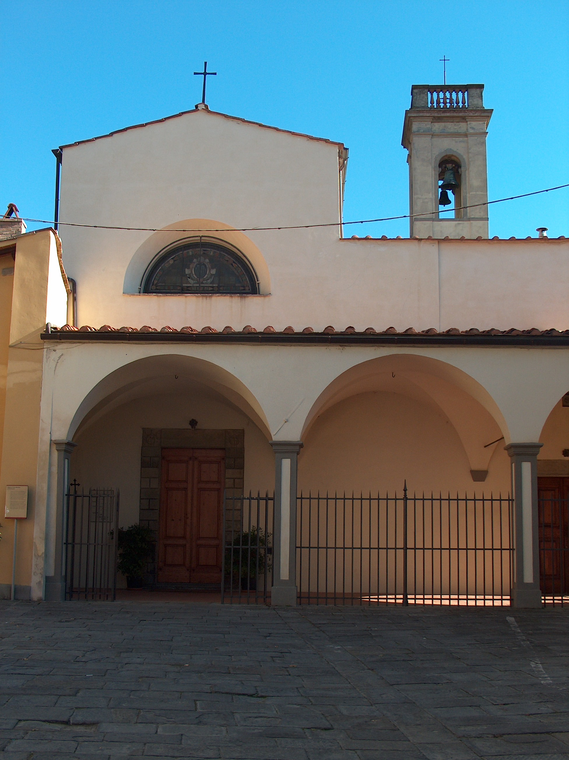 S.Michele a Rovezzano, Firenze Andrea Fontanelli